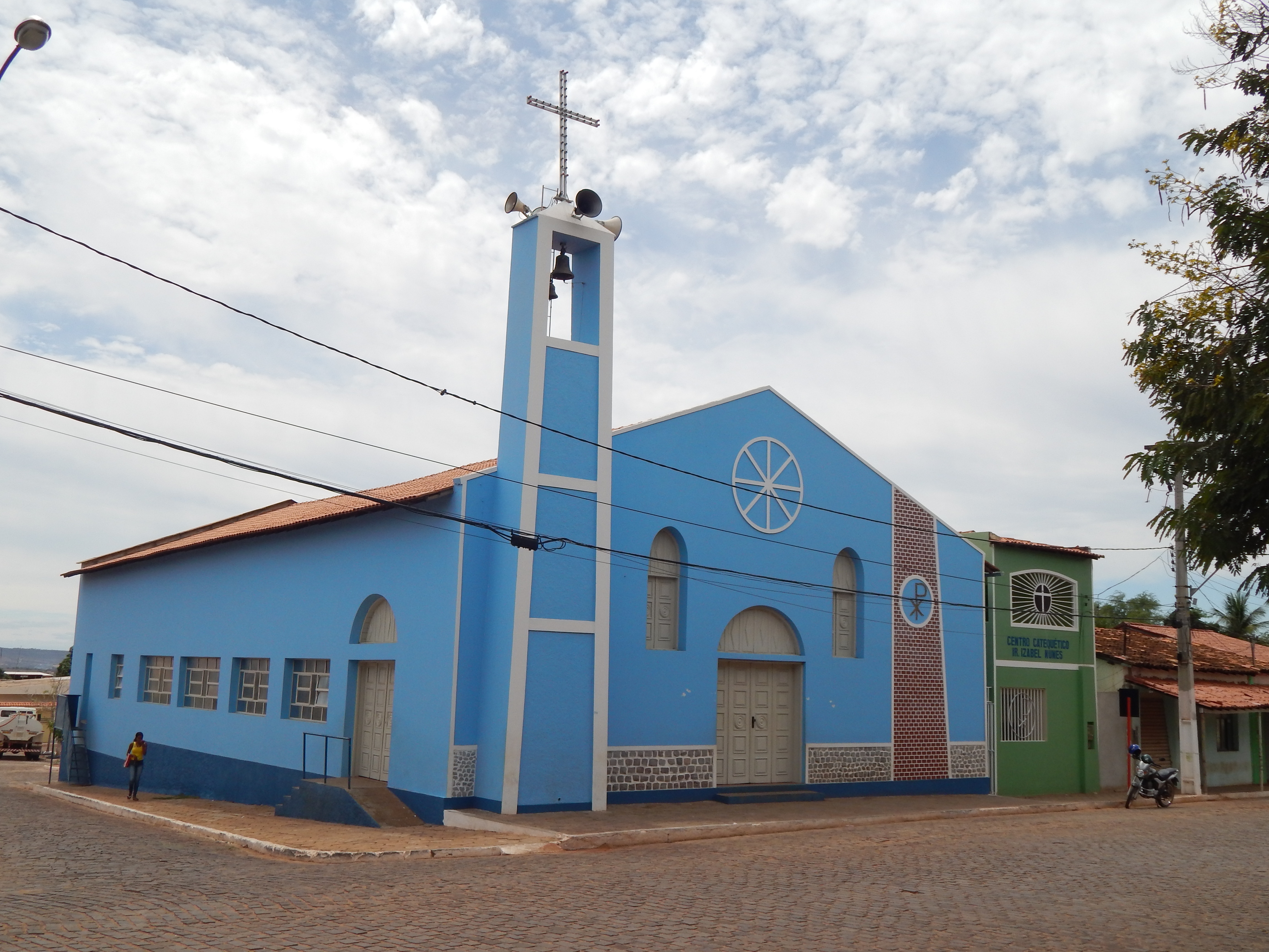 MATRIZ NOSSA SENHORA DA ABADIA